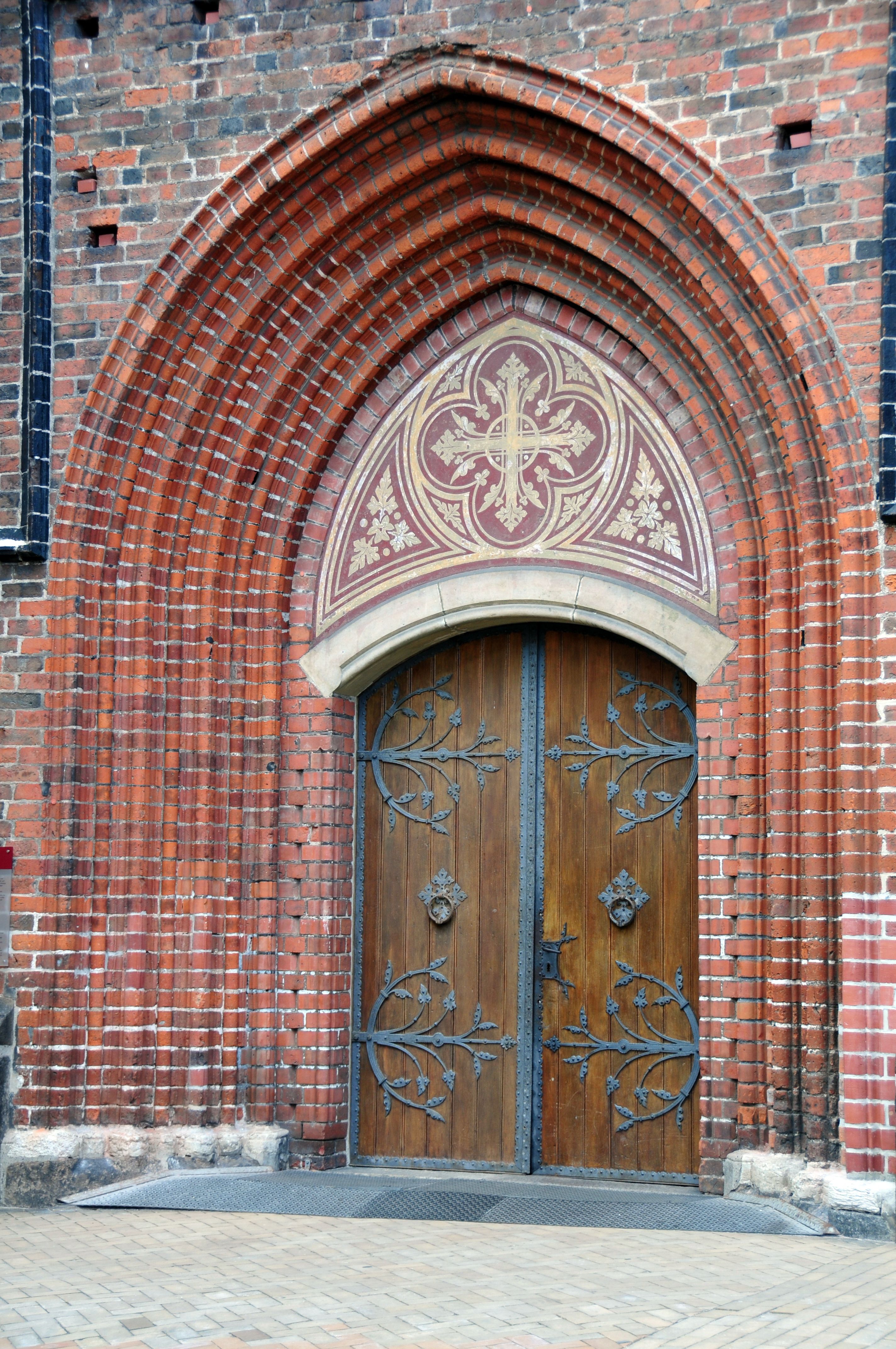 Schwerin; mit 50mm Brennweite von der Orangerie zum Bahnhof Türen und Tore verlangen förmlich nach der ehemaligen Normalbrennweite